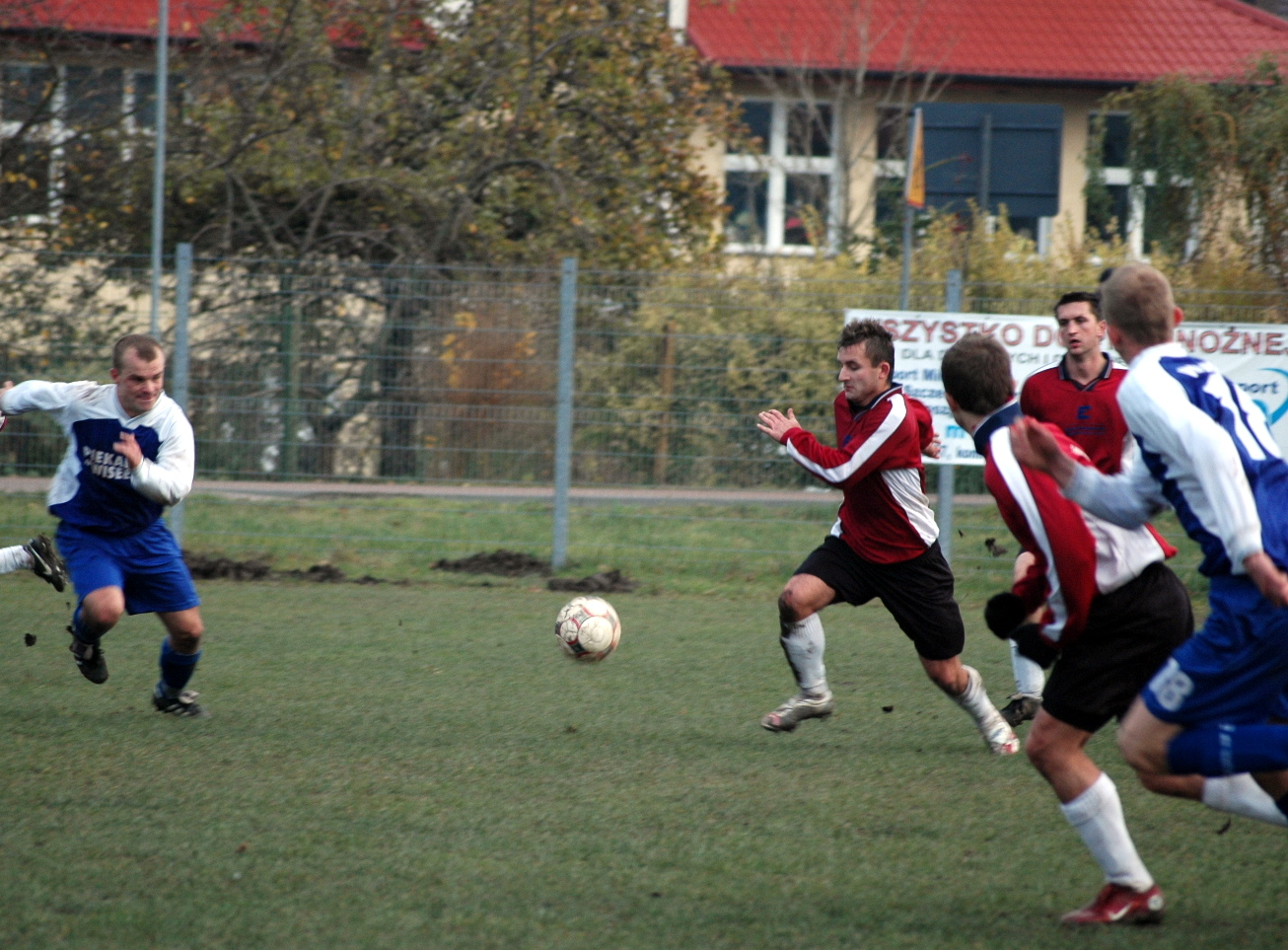 Mecz piłkarski w Wolinie pomiędzy czwartoligowymi zespołami Vinetą Wolin a Leśnikiem Rossa Manowo.